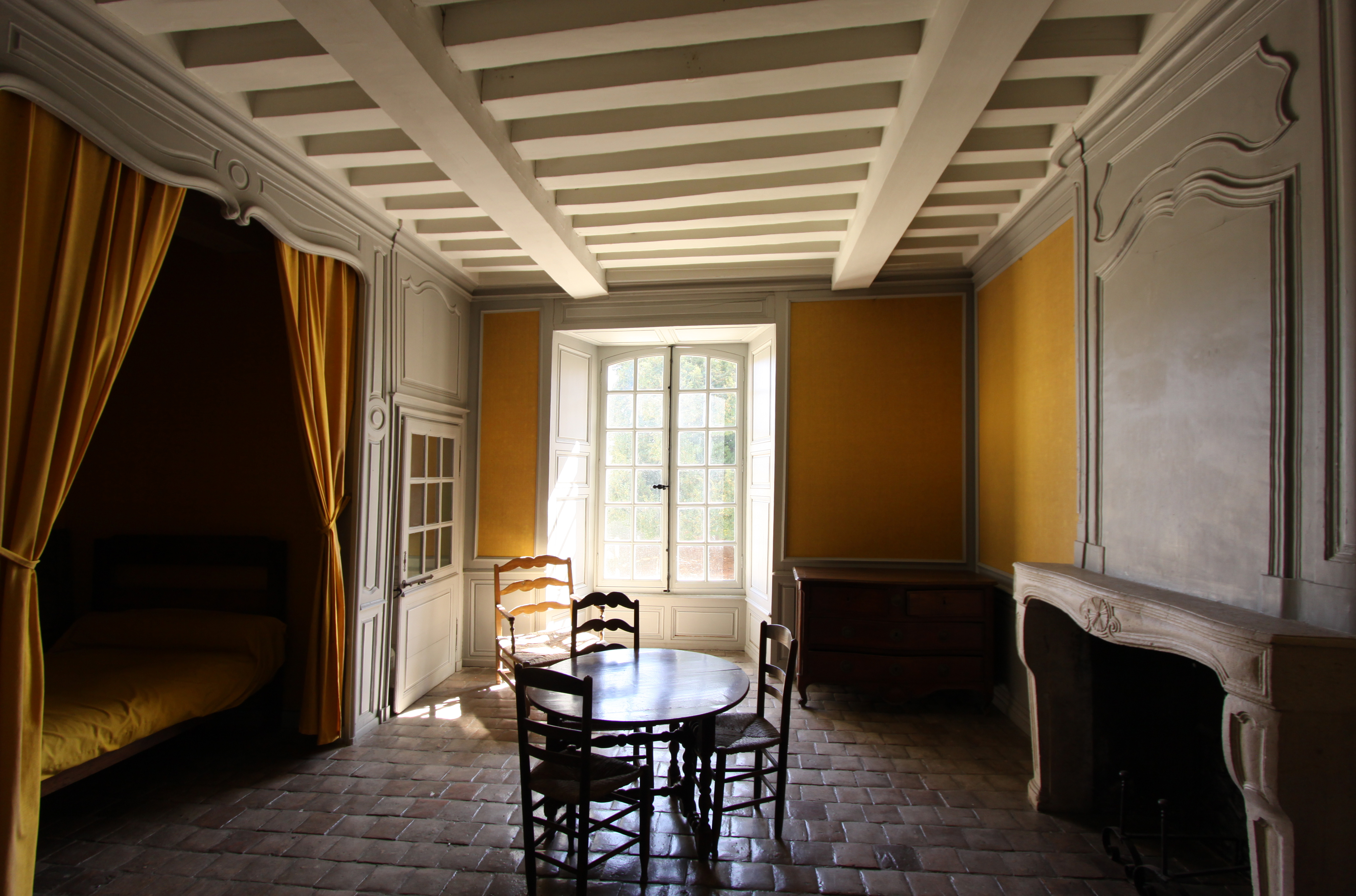 Zisterzienserklosters Noirlac im französischen Département Cher - Mönchzelle